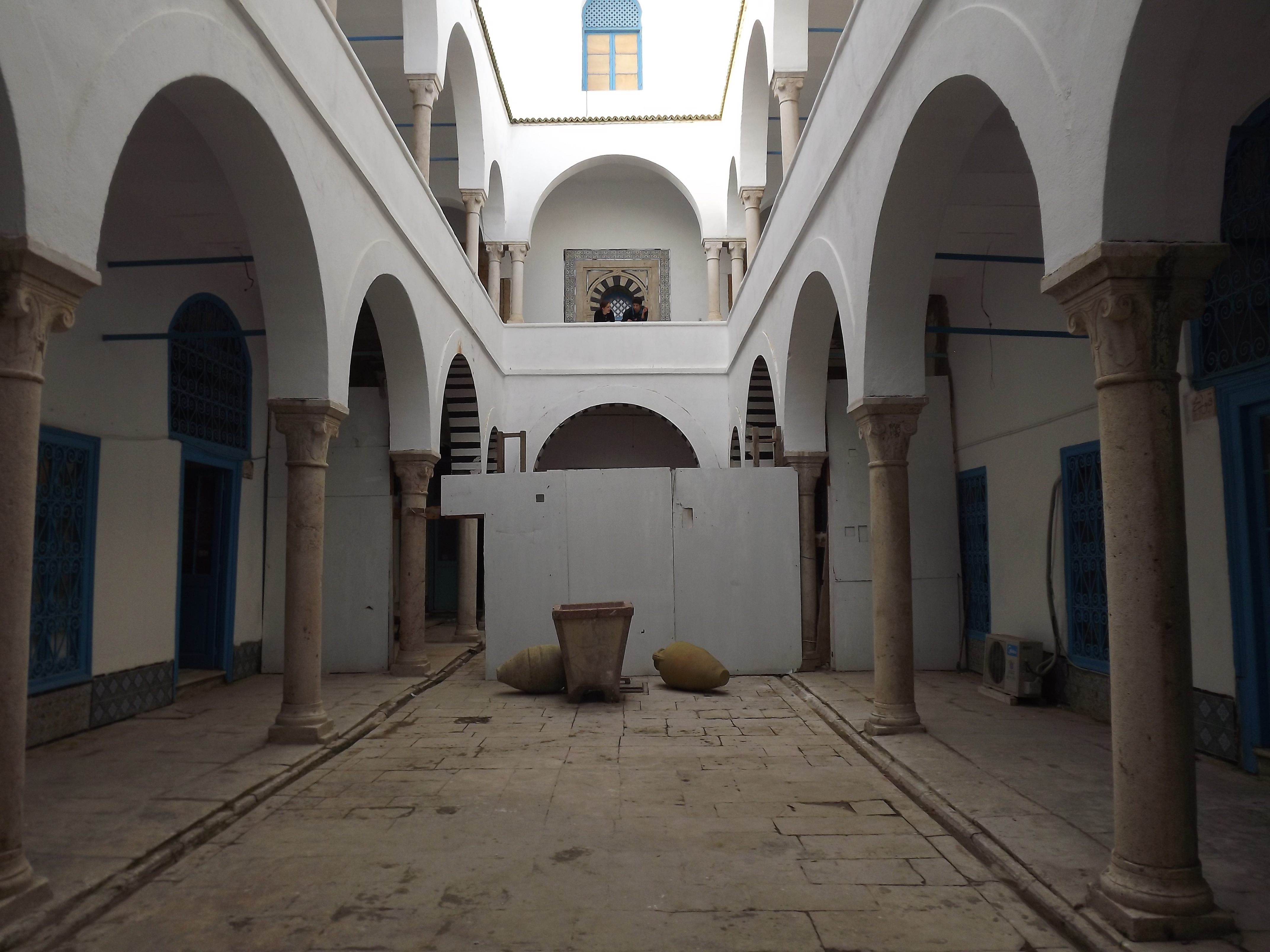 RDC de la caserne de sidi el morjeni